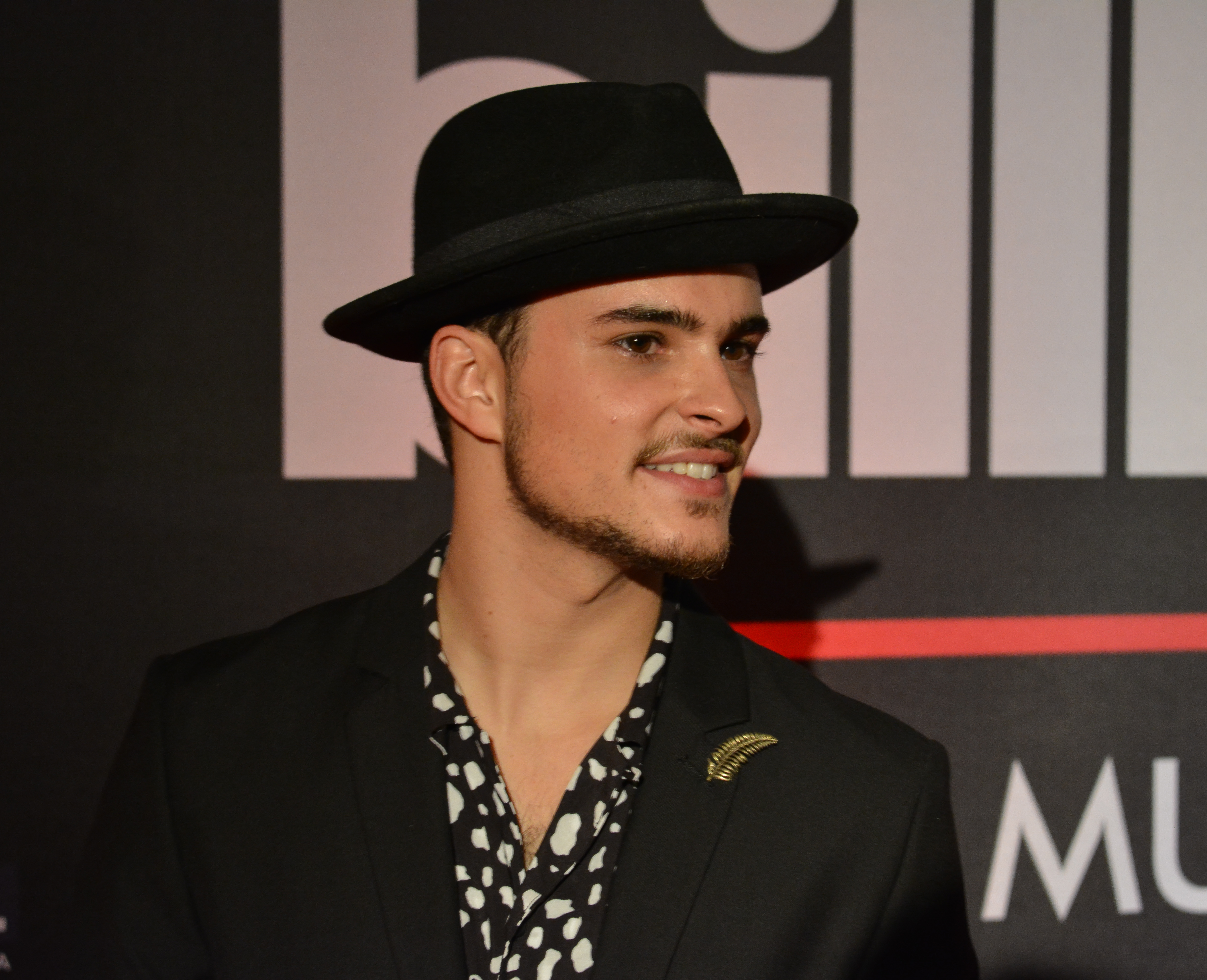 Gala Billboard Latin Music Showcase Chile 2018, Hotel Santiago, Santiago, Chile